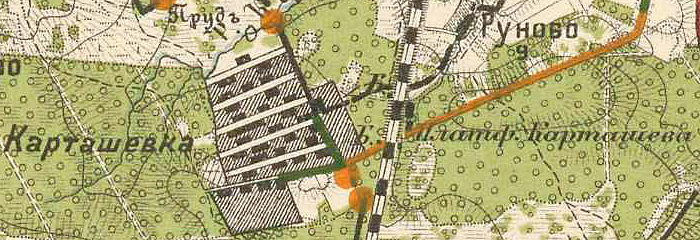 Карташевская на карте манёвров 1913 года.